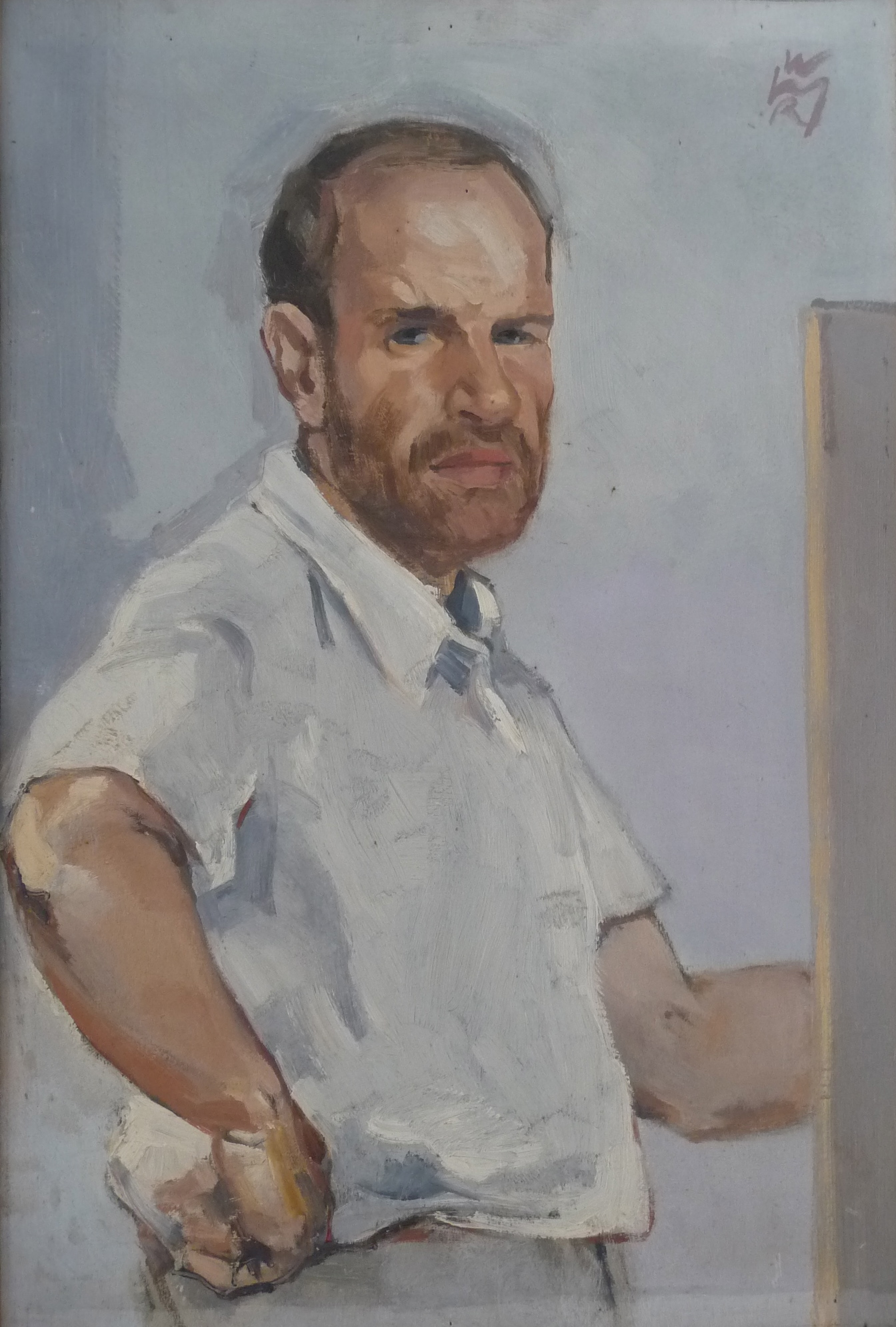 Rudolf Wilhelm Heinisch, Selbstbildnis, 1937, Oil on Canvas, 57 x 38